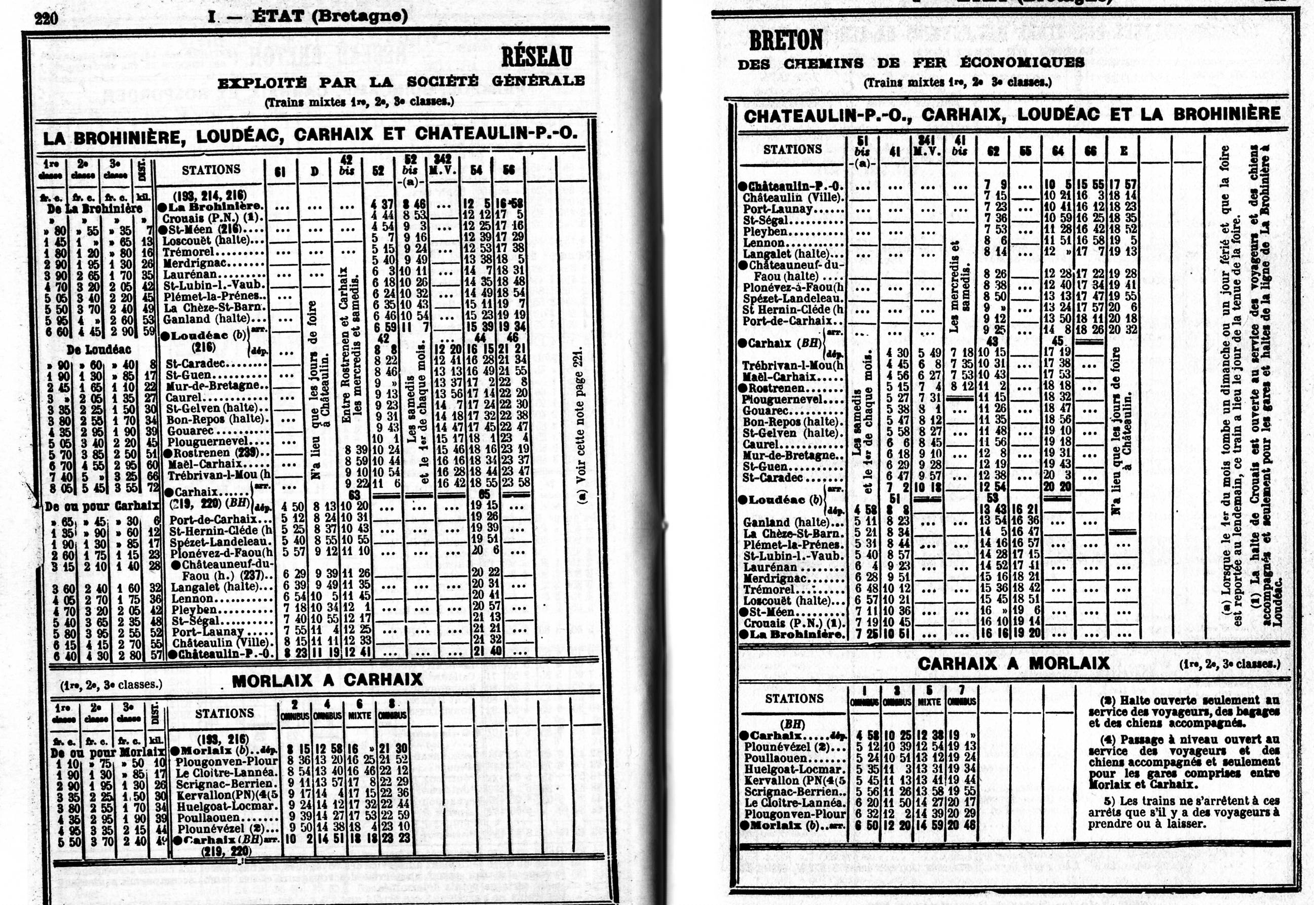 Livret horaire du Réseau Breton (Lignes La Brohinière, Loudéac, Carhaix, Chateaulin et Morlaix - Carhaix